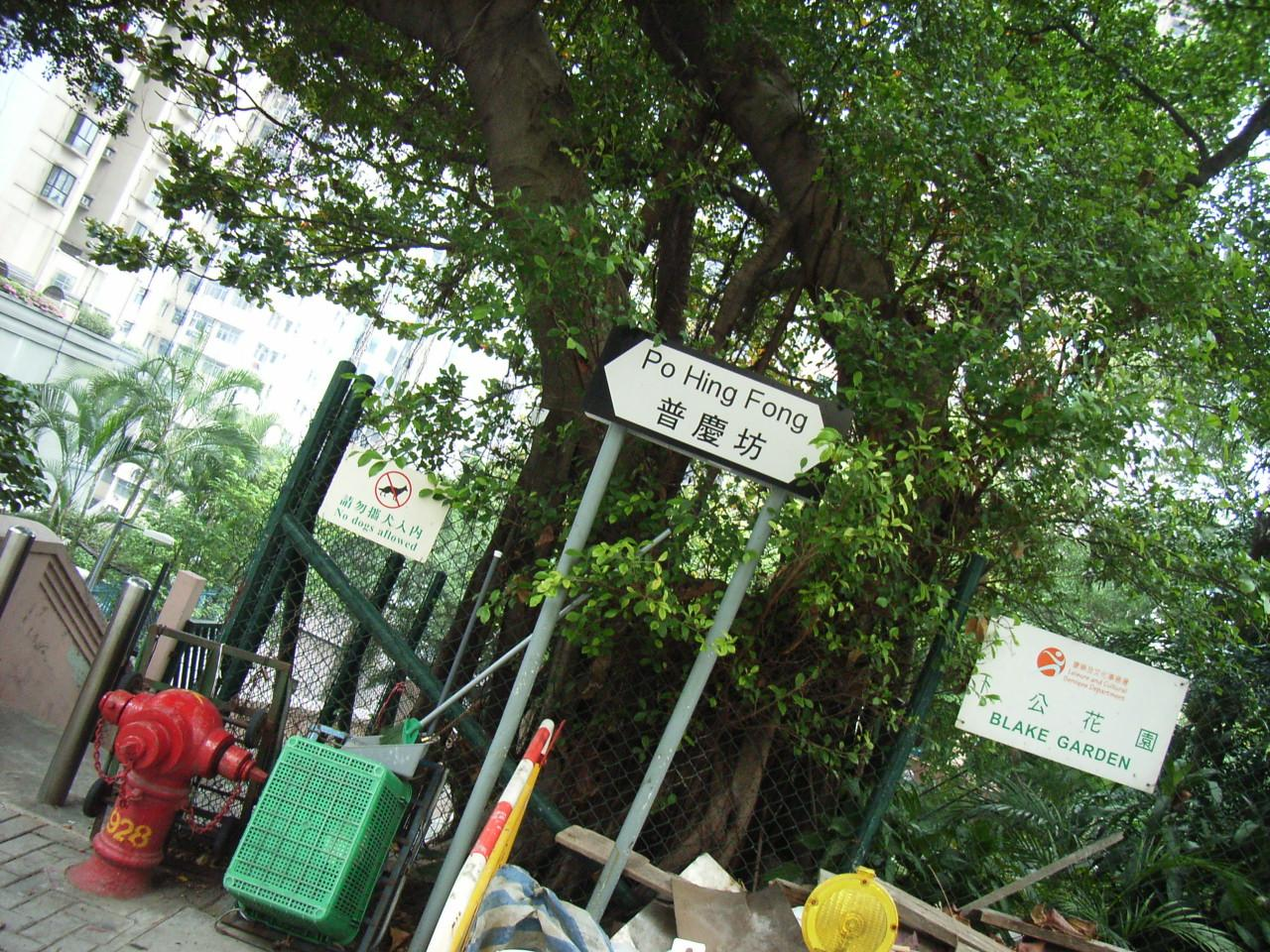 香港zh:上環普慶坊卜公花園, Sheung Wan, Hong Kong